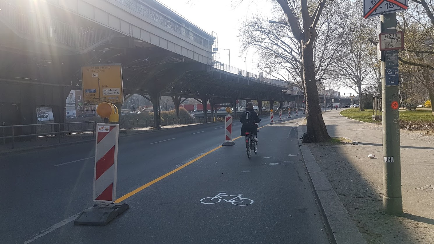 Provisorischer Radweg am Halleschen Ufer als Maßnahme gegen die Corona-Pandemie 2020